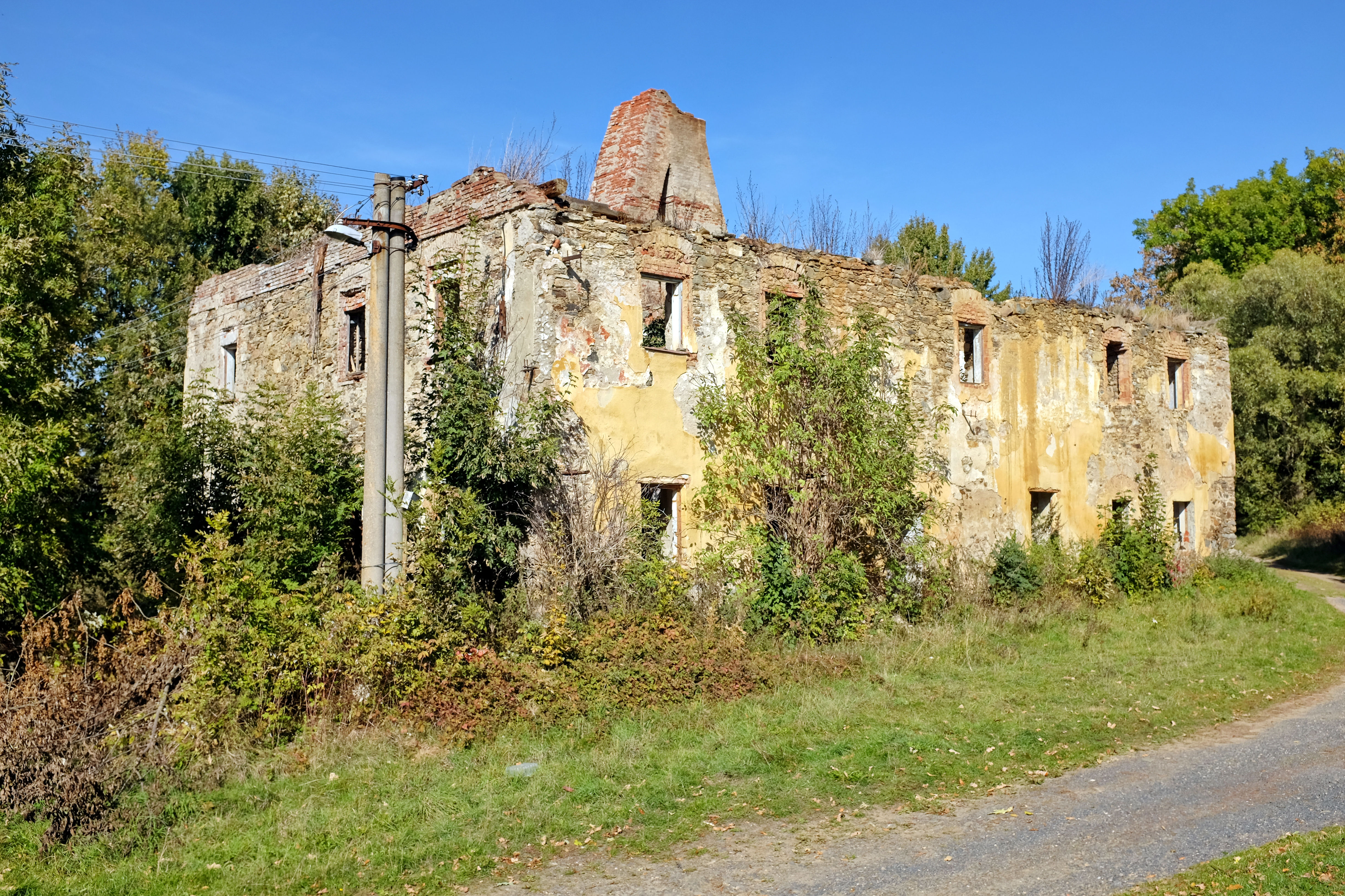 Ruina zámku Poutnov (Teplá), okres Cheb